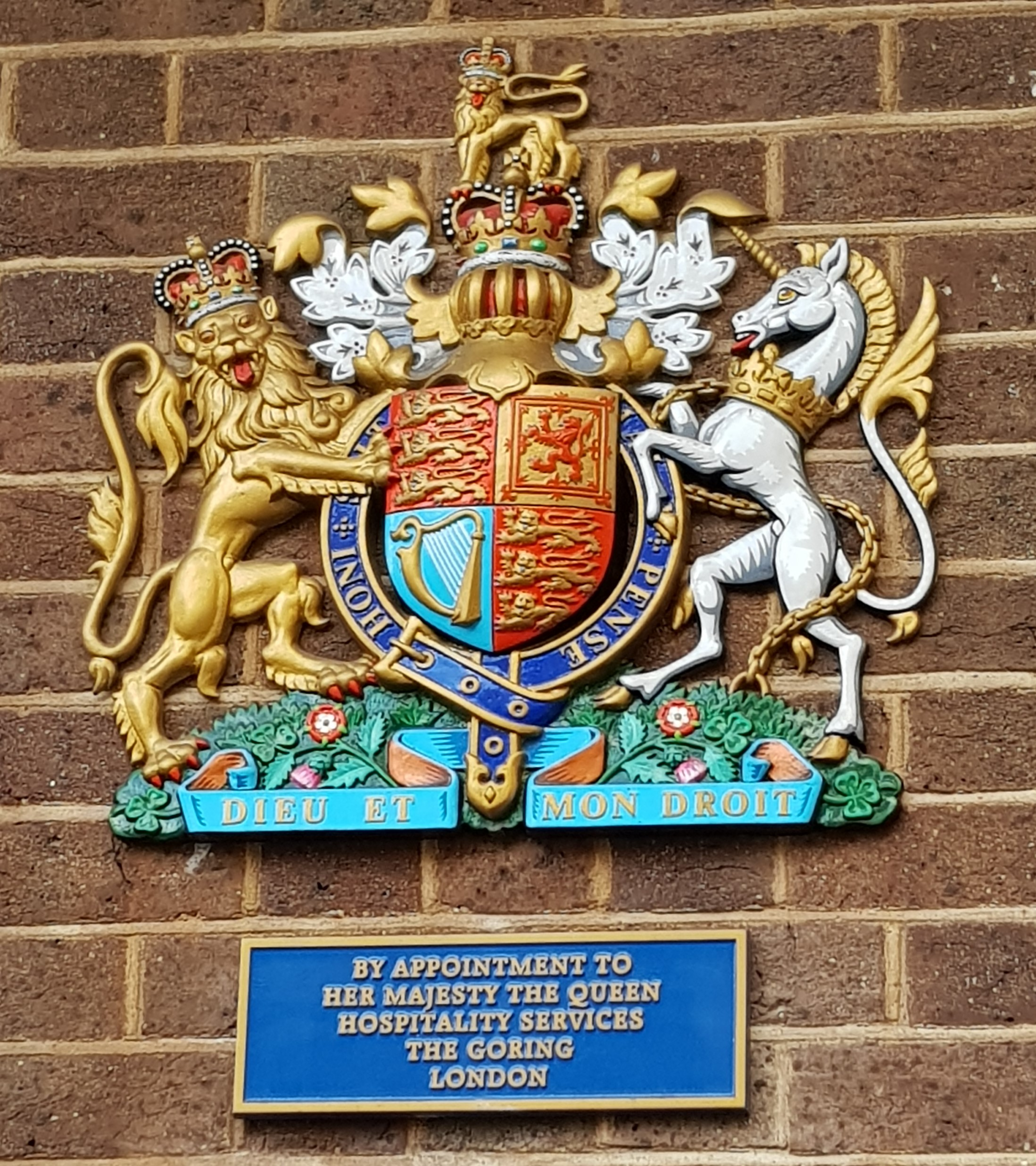 Label royal apposé sur la façade du Goring Hotel, Londres.